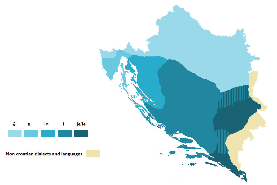 jat u hr. dijalektima u 14.st-u